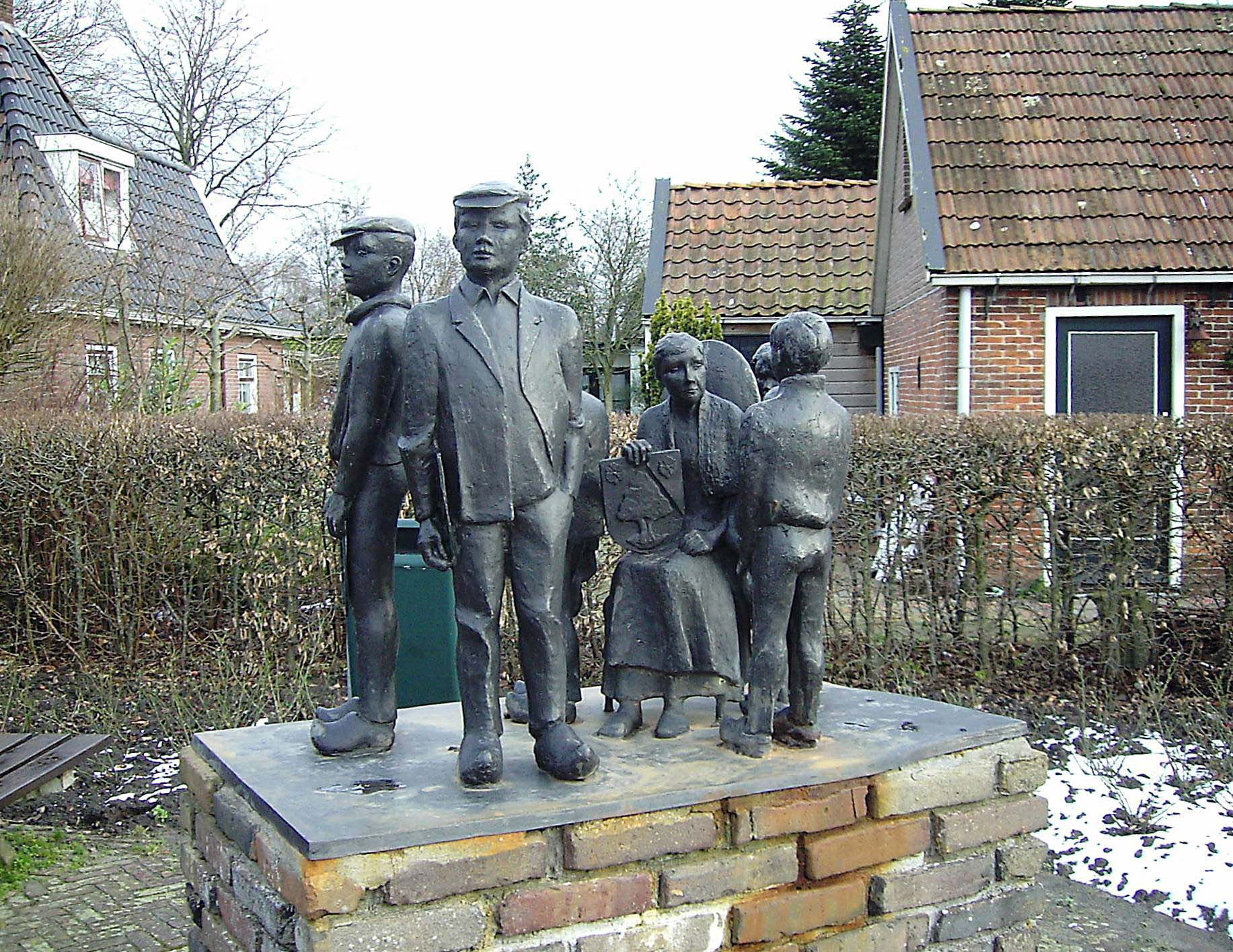 Annet Haring,1986